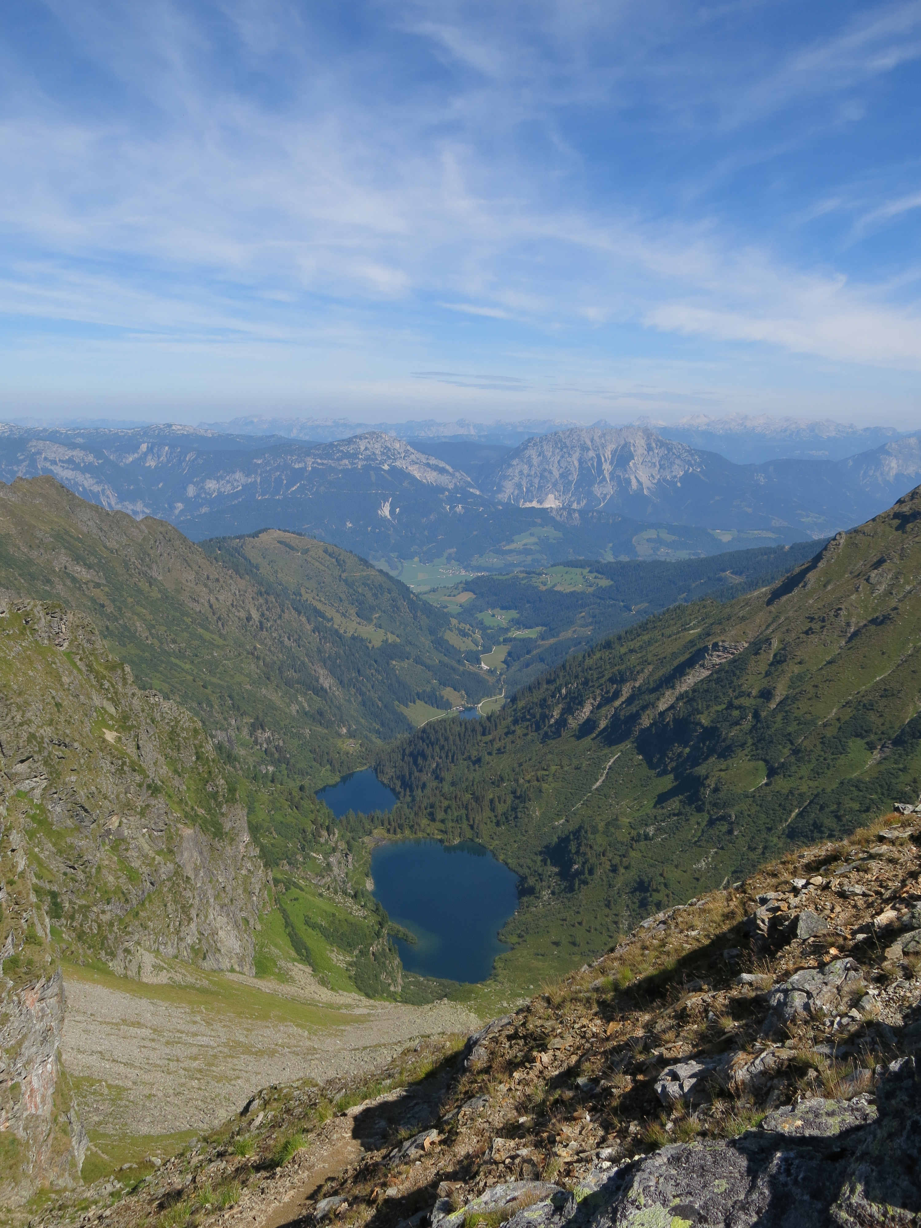 Blick aus der Neualmscharte (2347 m) ins Seewigtal, dessen höhere Lagen Teil des Naturschutzgebiets Bodensee Sattenbachtal sind. This media shows the nature reserve in Styria with the ID NSG a 12.